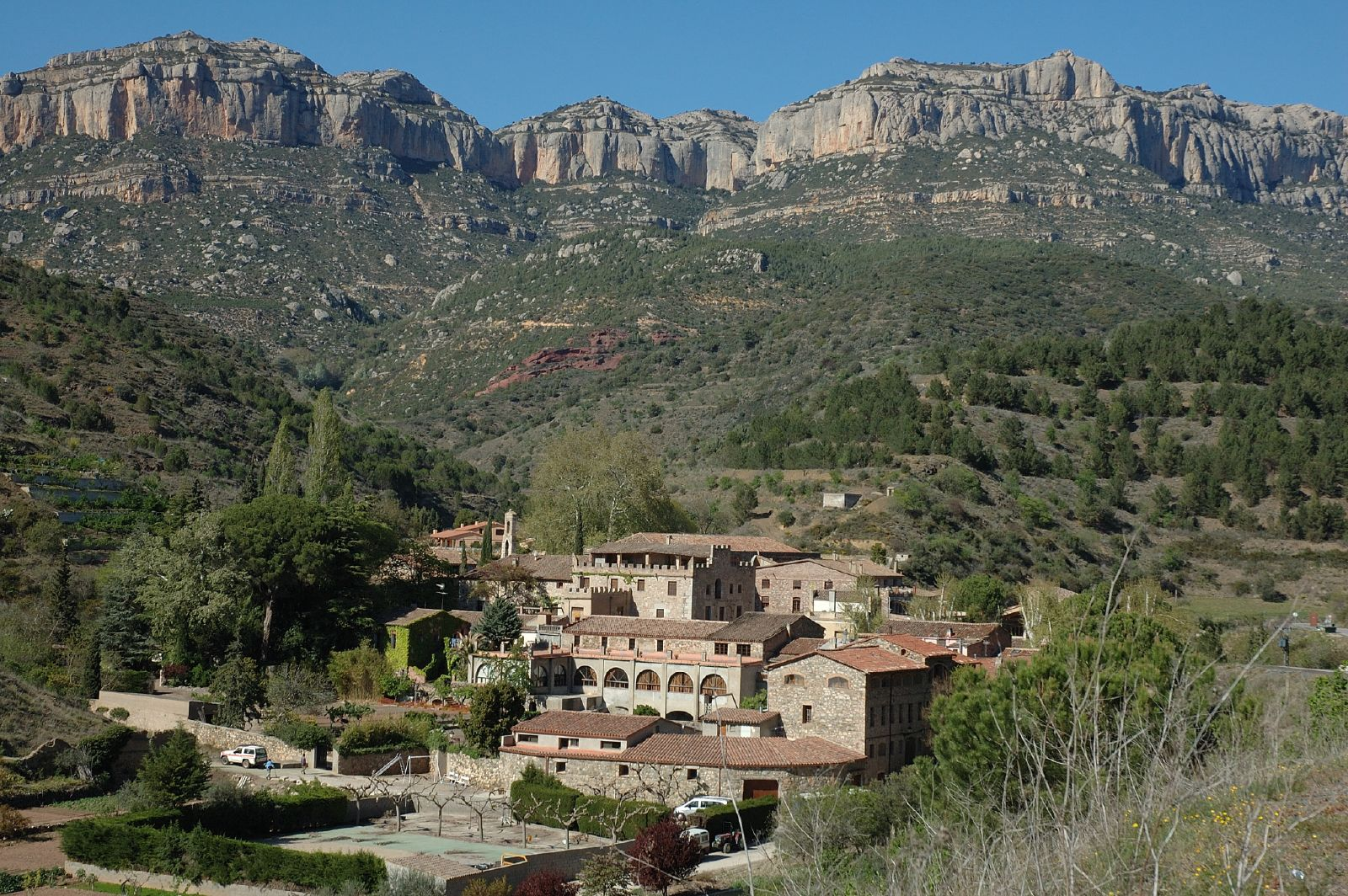 Scala Dei sota el tossal del vessant sud del Montsant